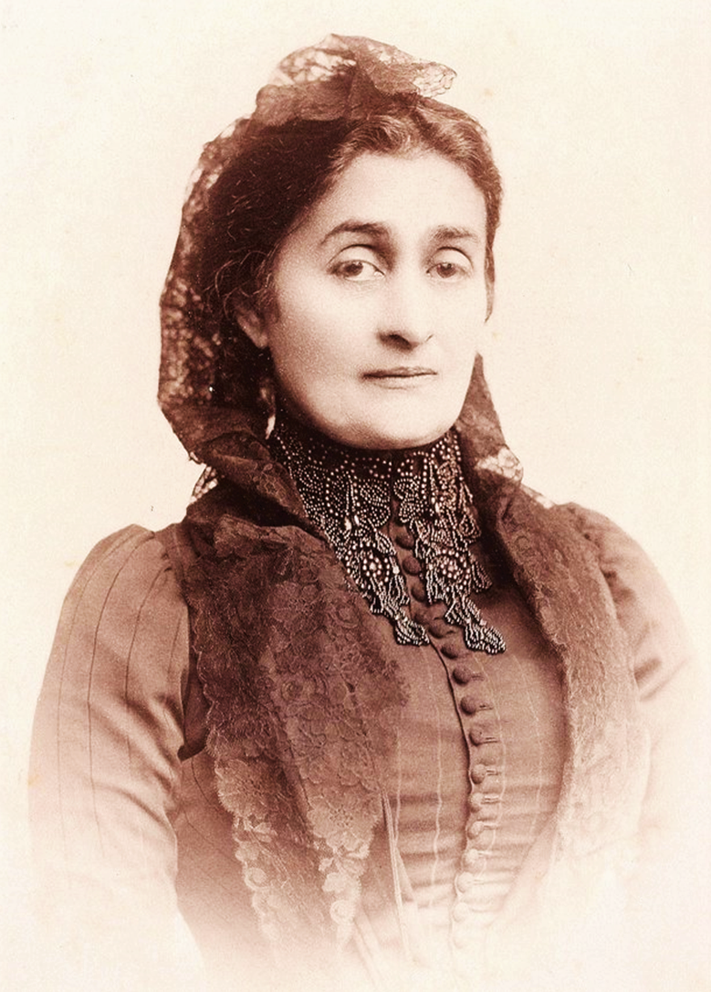 Anna von Kalmucki (* 03. November 1811; † 22. August 1896), Gattin des Fhr. Iordaki Wassilko von Serecki, Anno 1860